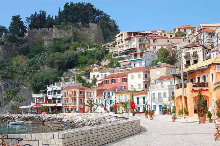 Πάργα